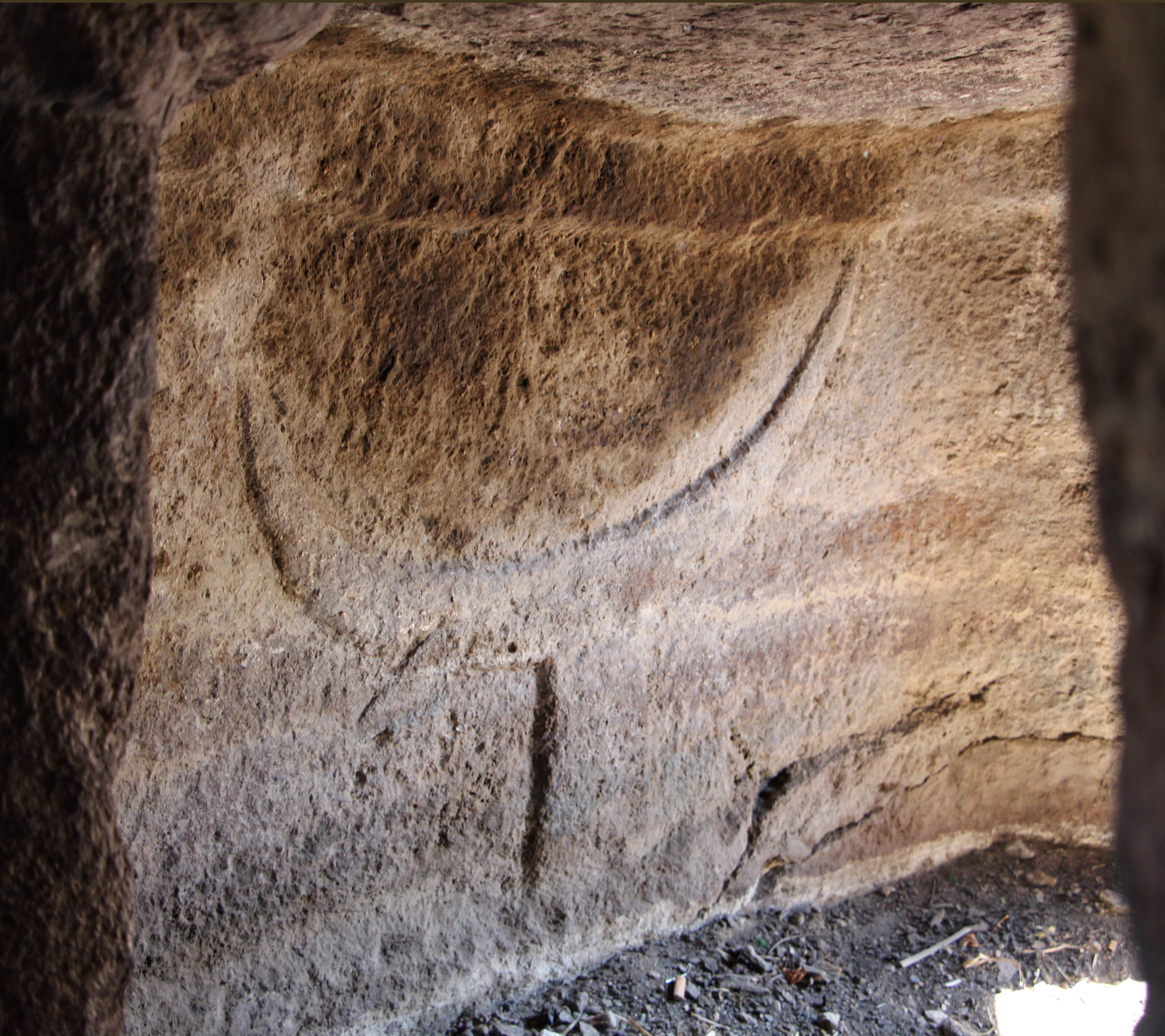 Castelsardo